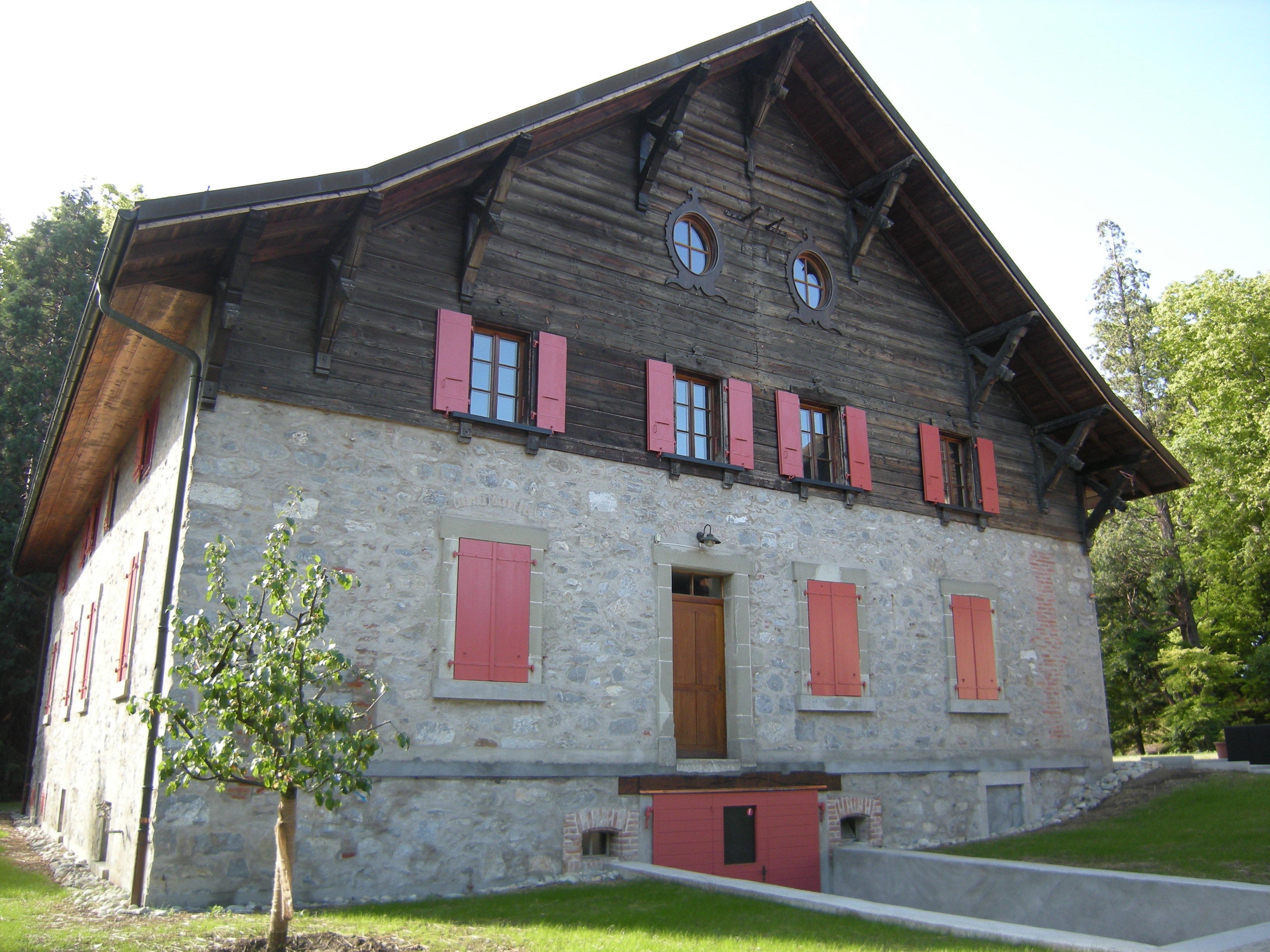 Fondation Jean Monnet pour l'Europe - Ecublens